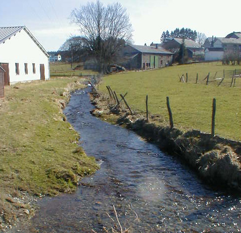 el Lesse a Ôtchamp.